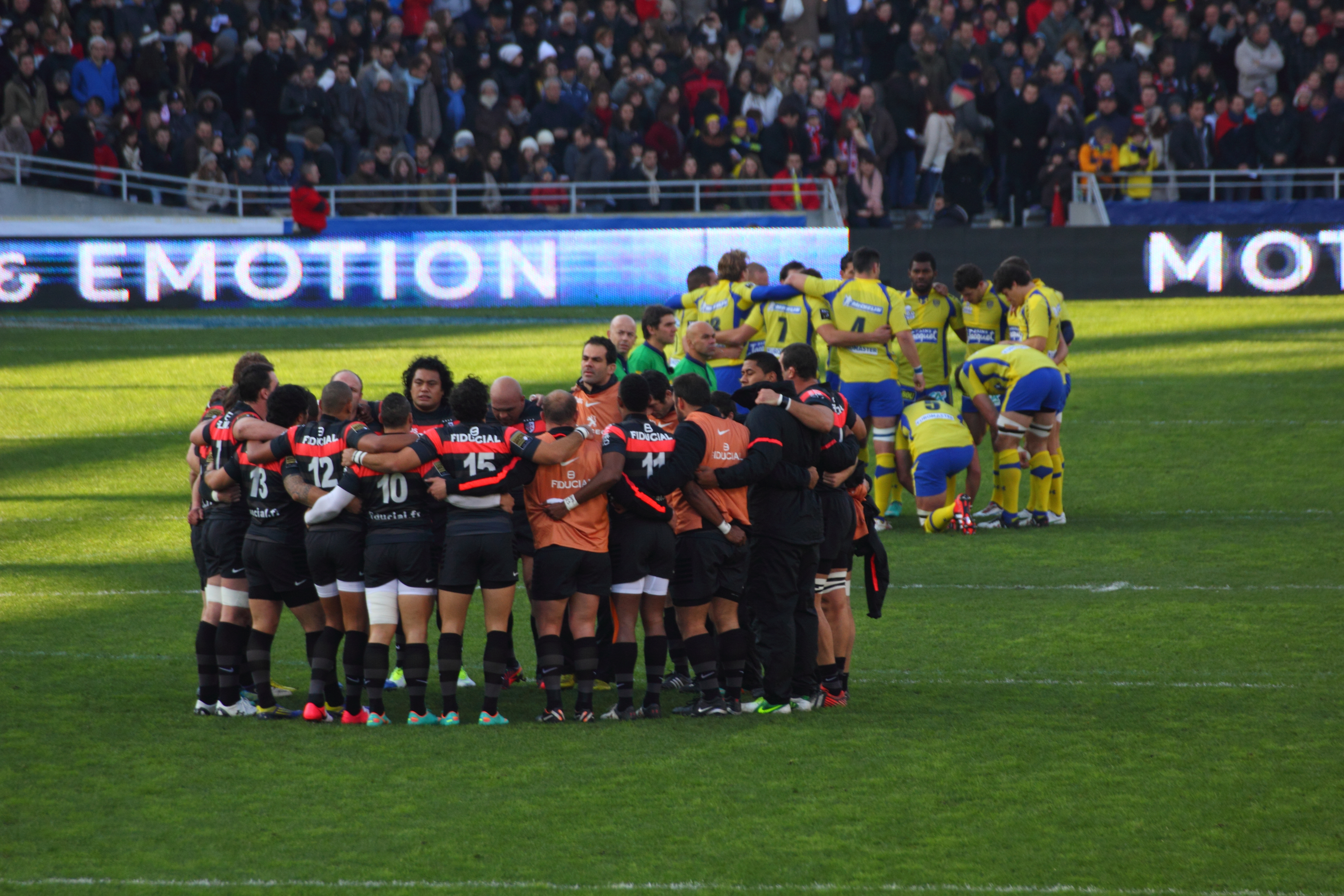 Top 14 2012-2013 — 1 décembre 2012, Stadium de Toulouse. Match between: Stade toulousain — ASM Clermont-Auvergne Une minute d'applaudissement en hommage à la mort de Maleli Kunavore